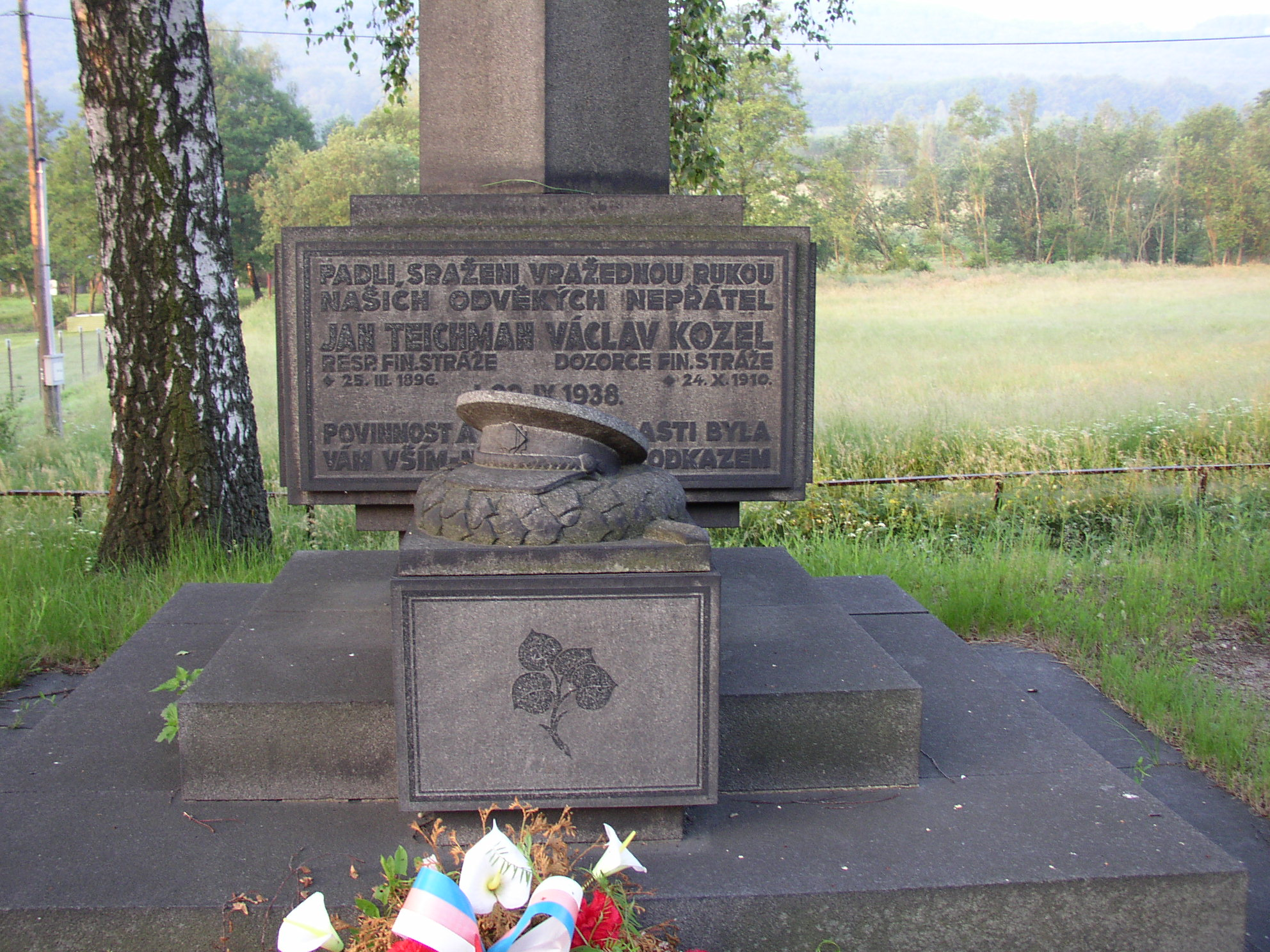 Památník příslušníků finanční stráže, Dolní Podluží , okres Děčín, Česká republika